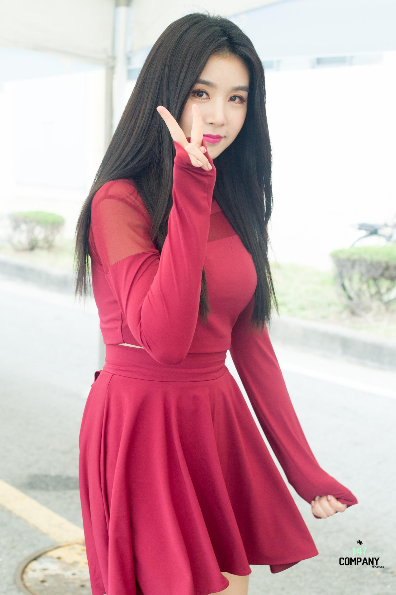 [16.04.23] 세종시민체육대회 한마음 콘서트